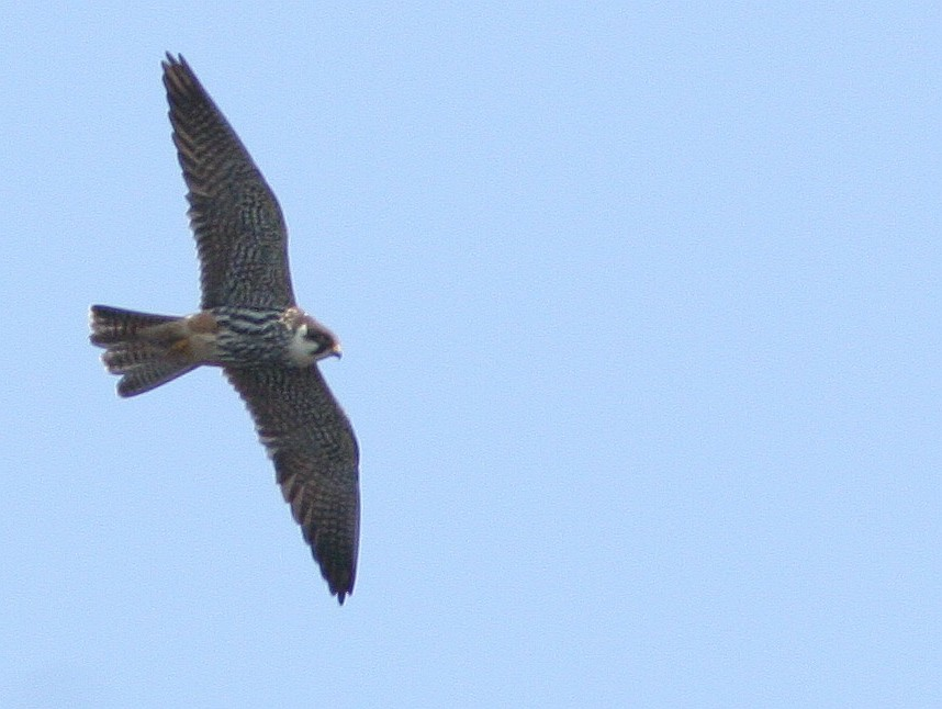 Falco subbuteo in Lasy Janowskie, Poland